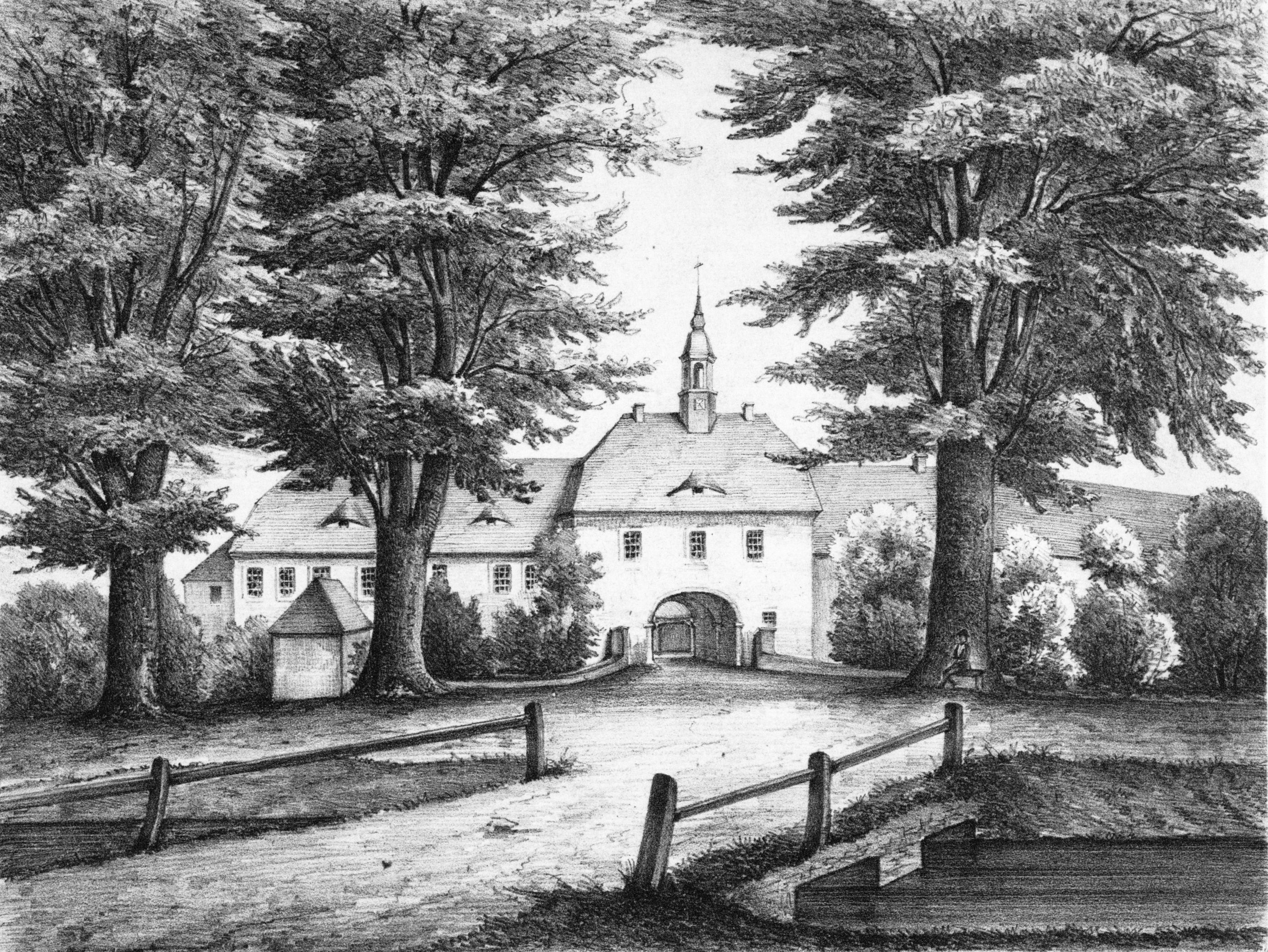 Das Rittergut Ober-Putzkau im 19. Jahrhundert